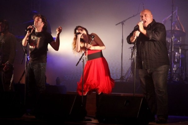 איילת רובינסון, באופרת הרוק-"מלחמה". מאת קובי ויטמן, בבימויו של איקה זהר, בתיאטרון תמונע.